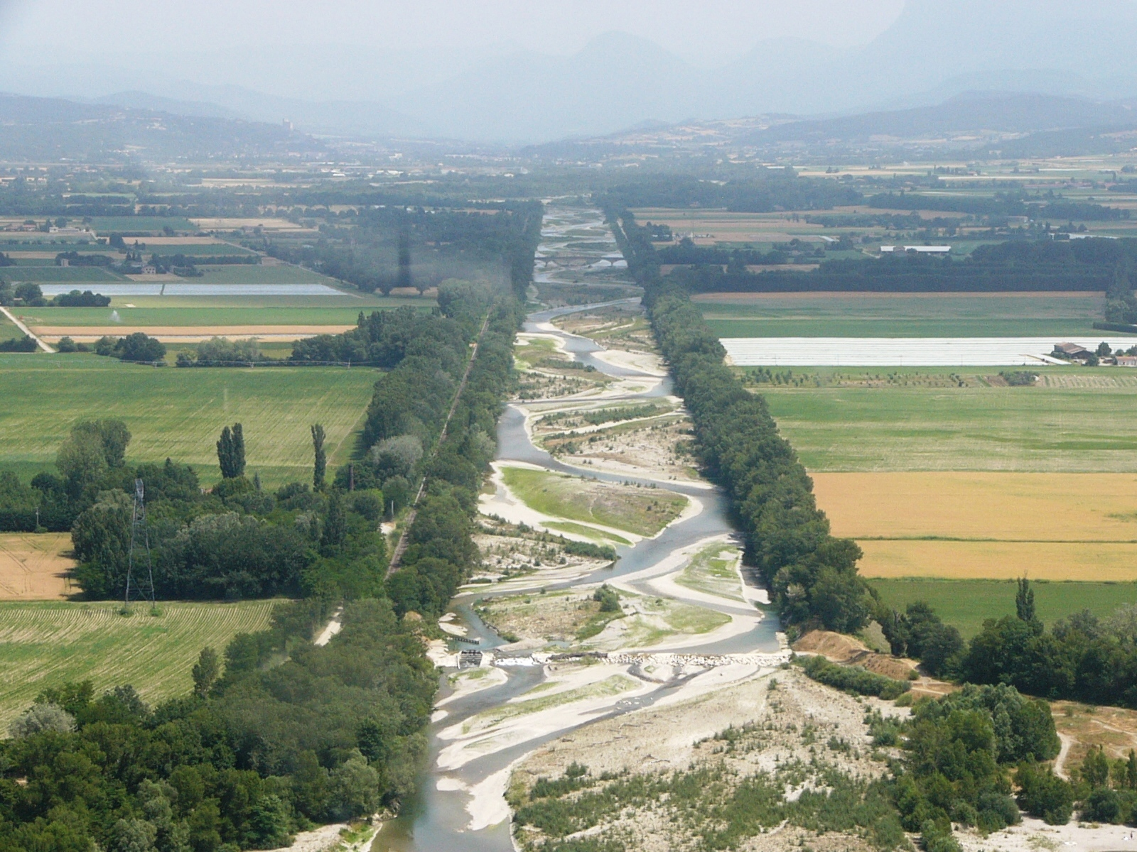 La rivière Drôme endiguée à hauteur des communes d'Allex et Grâne